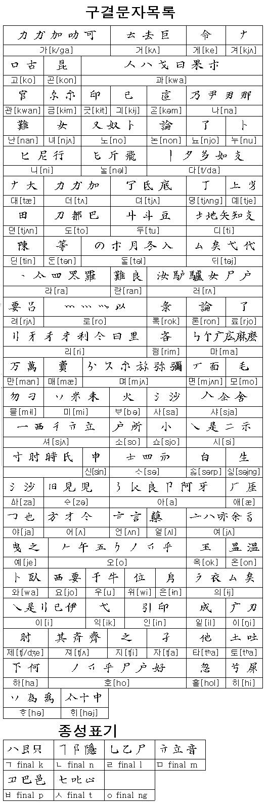 구결표(口訣表) 구결문자목록(口訣文字目錄)종성표기(終聲表記)